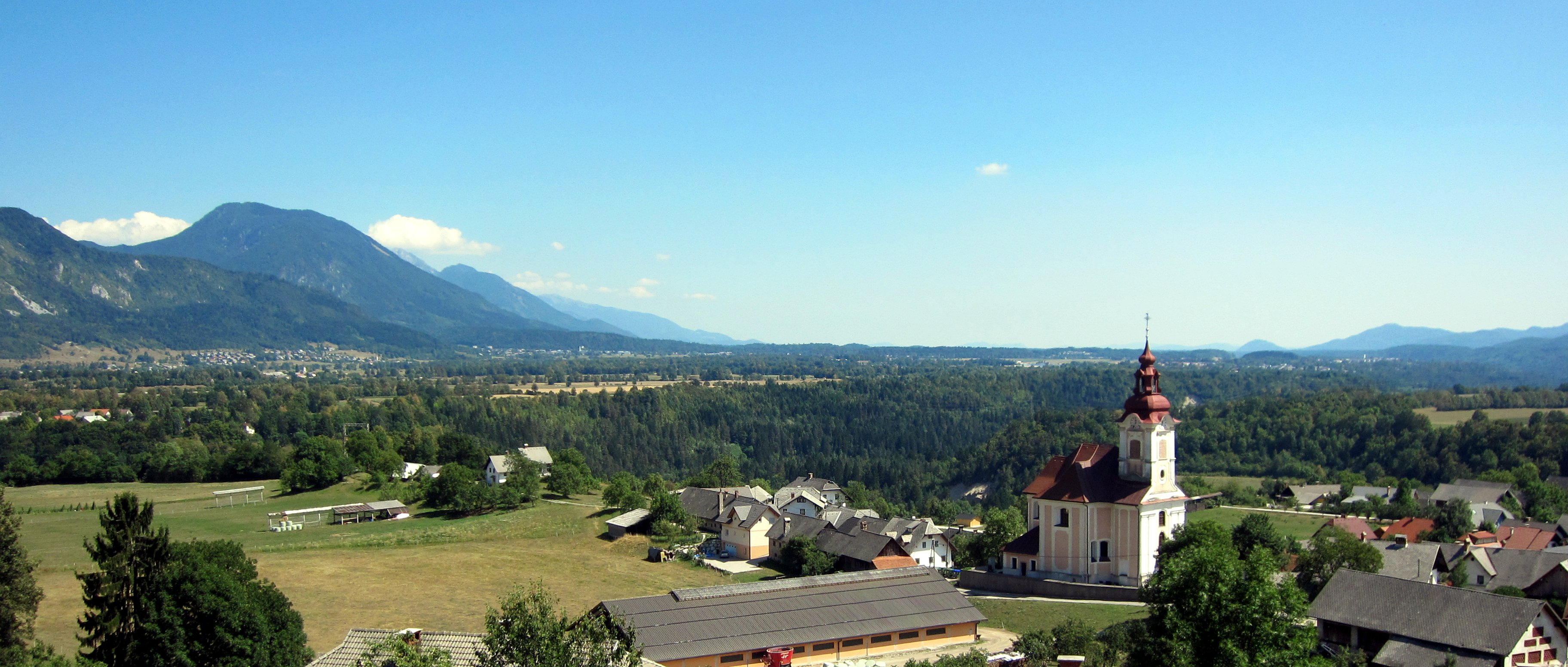 Slovenia - Lago di Bled